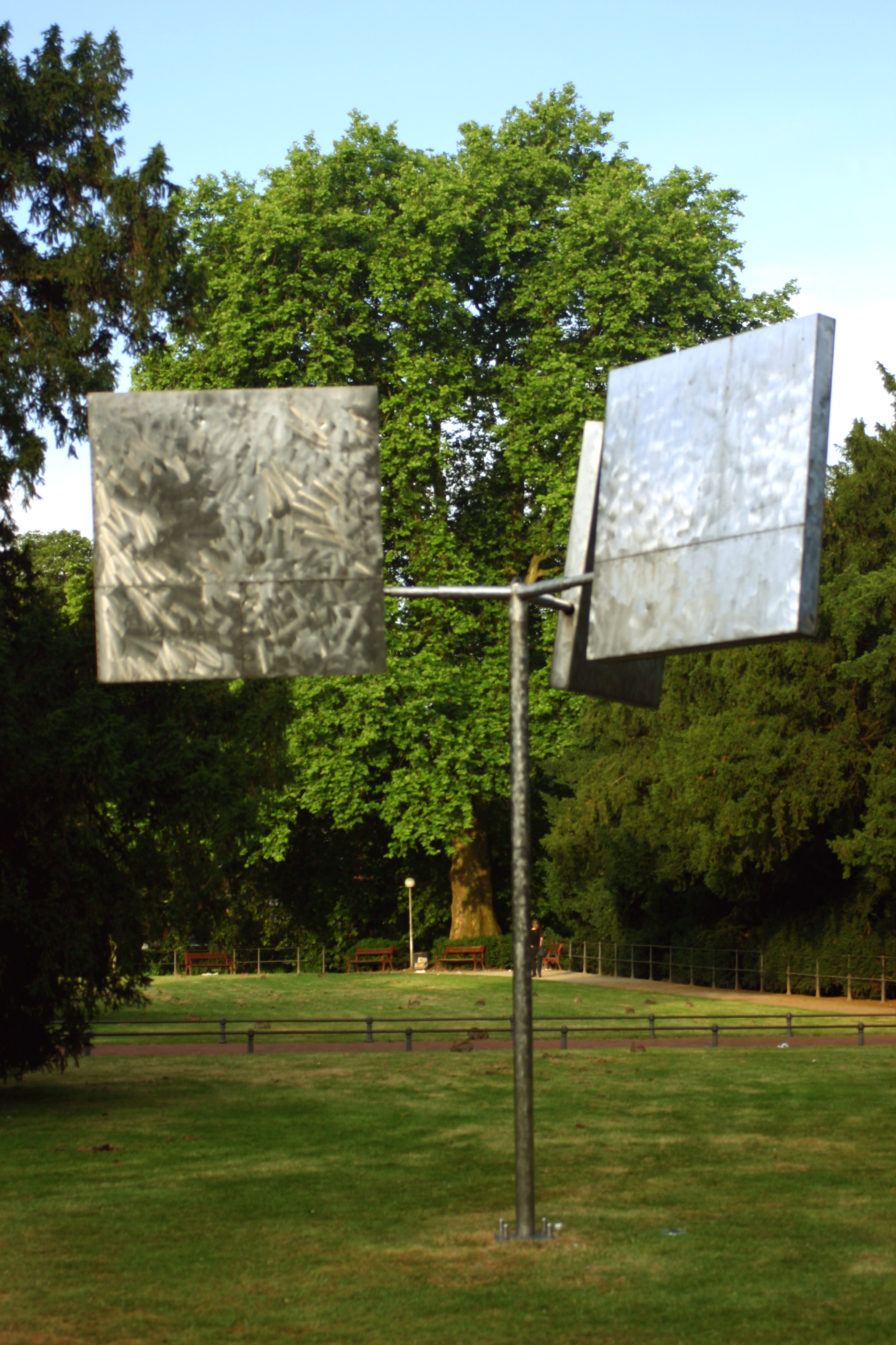 Skulptur Drei rotierende Quadrate Künsterler: George Rickey aus dem Jahre 1973 auf der Engelenschanze Standort: Promenade in Münster, Westfalen, Deutschland